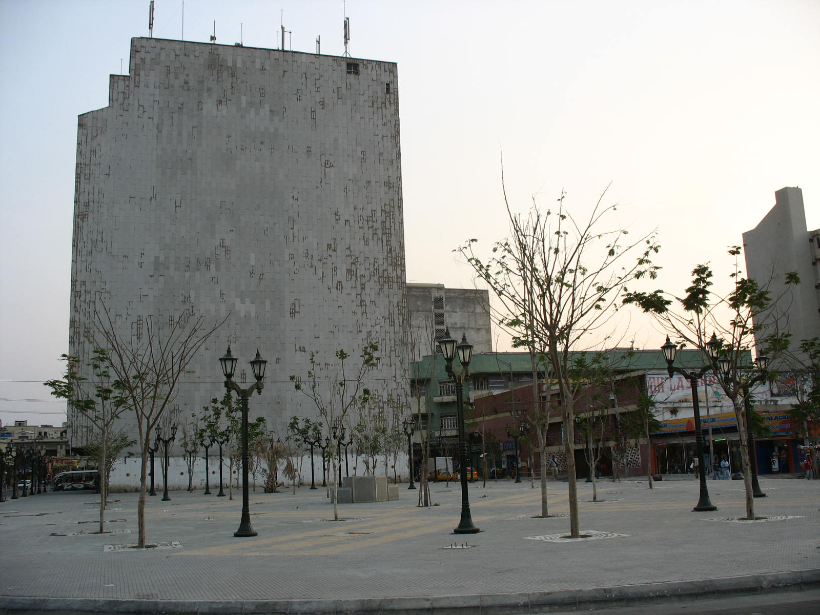 edificio atravesado de la Caja Agraria, Barranquilla